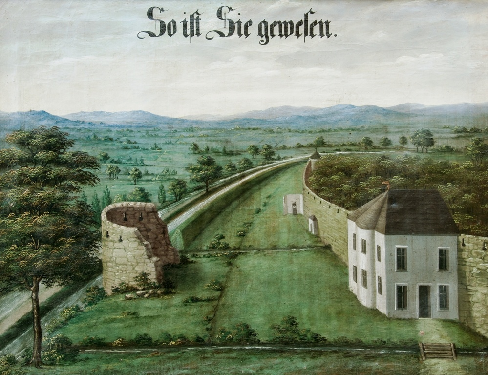 Střelnice na místě dnešního Muzea Litovel, jak pravděpodobně vypadala roku 1786. Olej. Autor: Donát Ulrich, olej na plátně, 80×65 cm, kolem roku 1870.